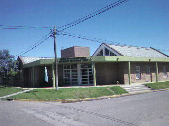 Jardin de infantes en Moquehuá, partido de Chivilcoy, provincia de Buenos Aires, Argentina.